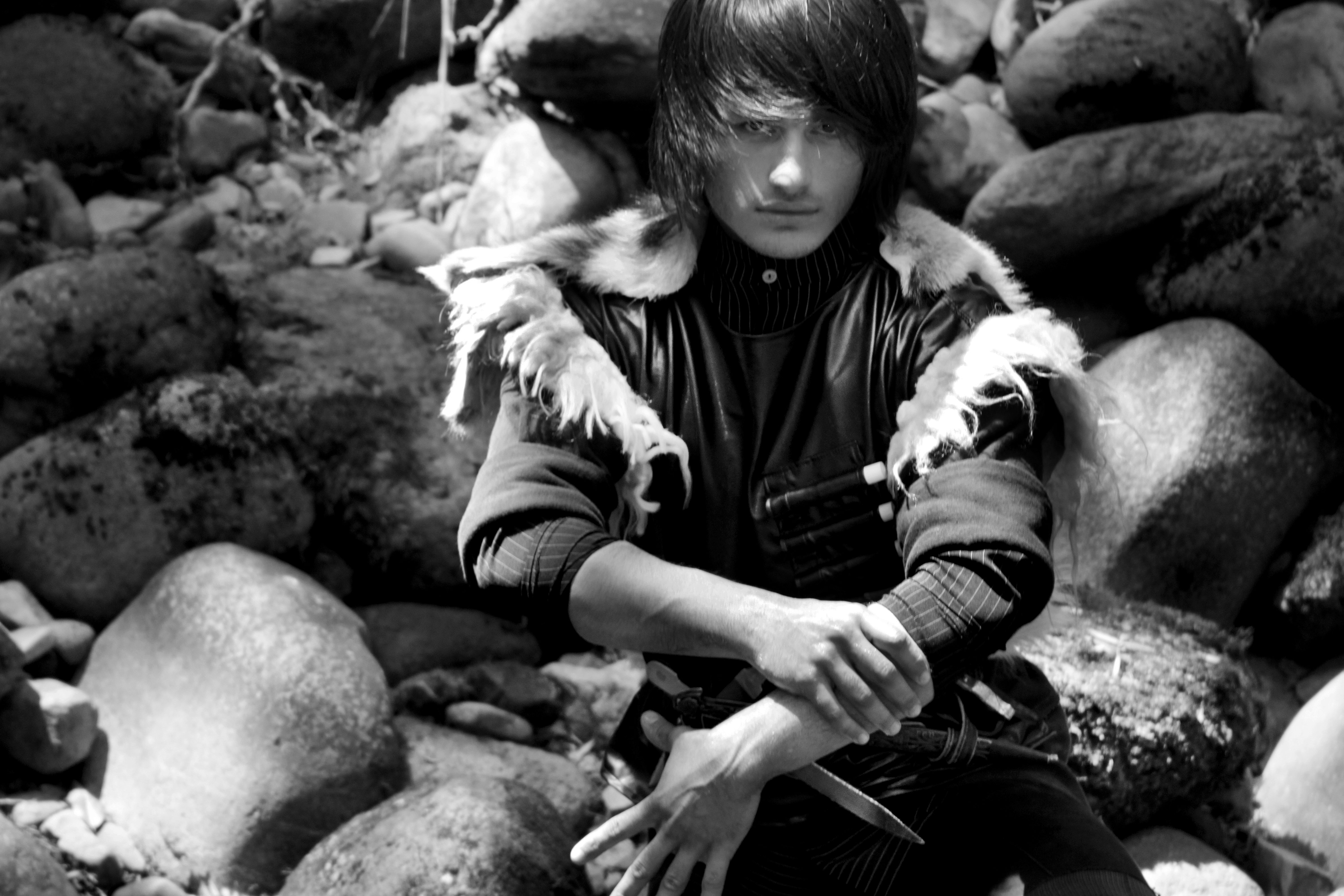 მოცეკვავე აბრაგულის ფორმით